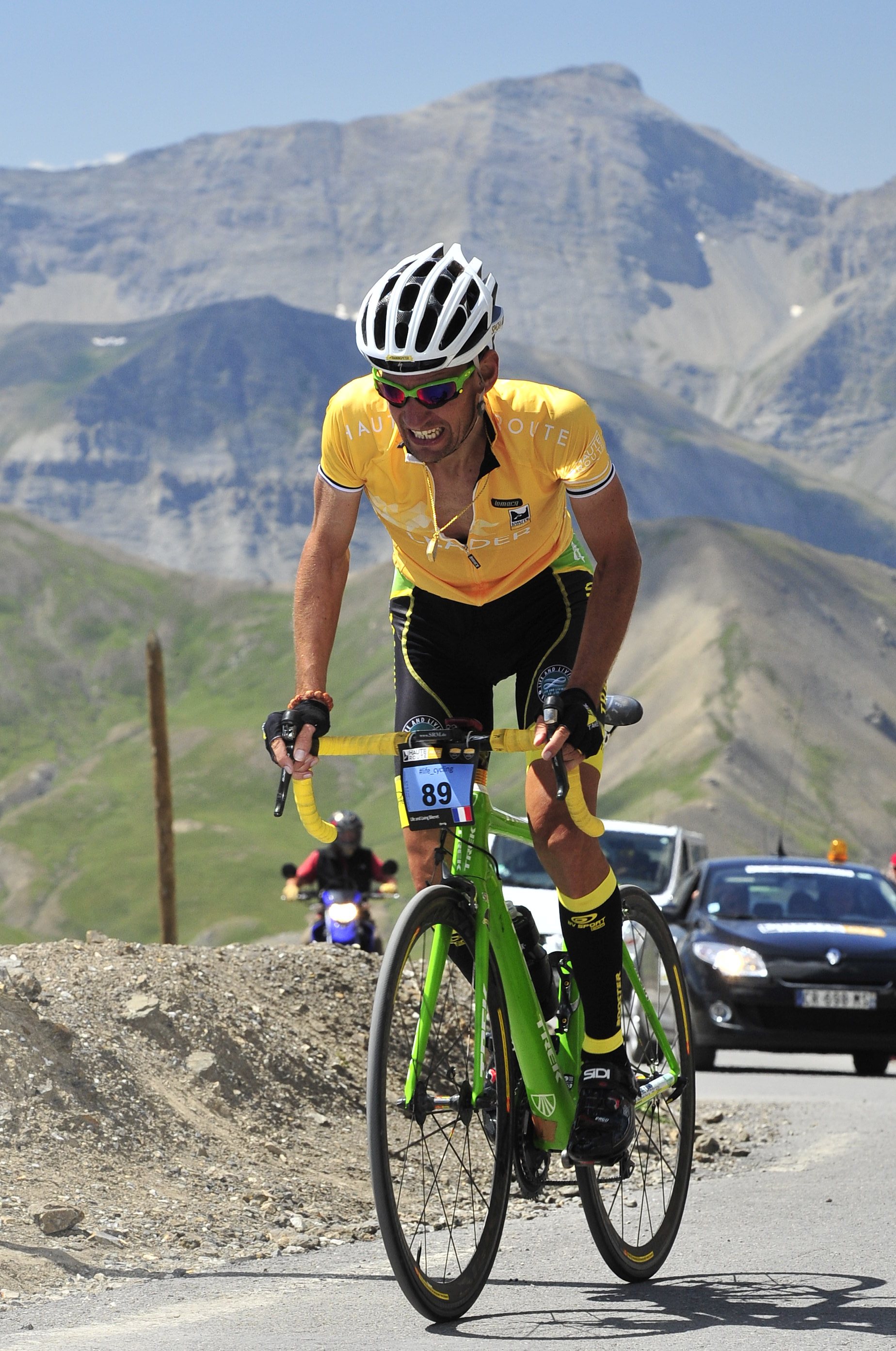 Contre la Montre Cime de la Bonette Haute Route 2013